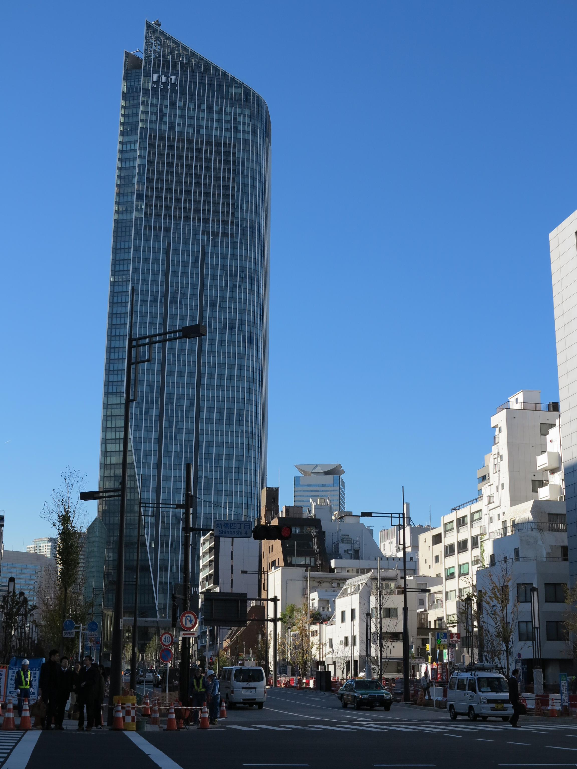 環二通りから虎ノ門ヒルズを臨む。新橋4付近